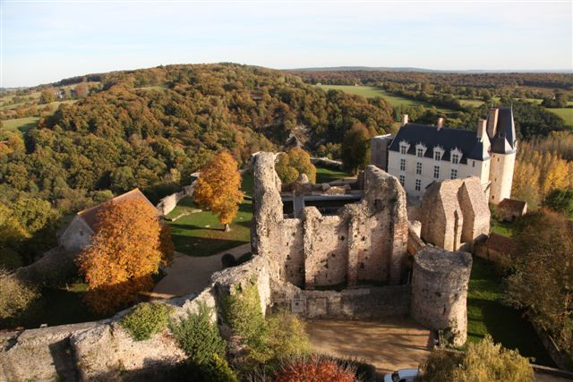 Château de Sainte-Suzanne 53